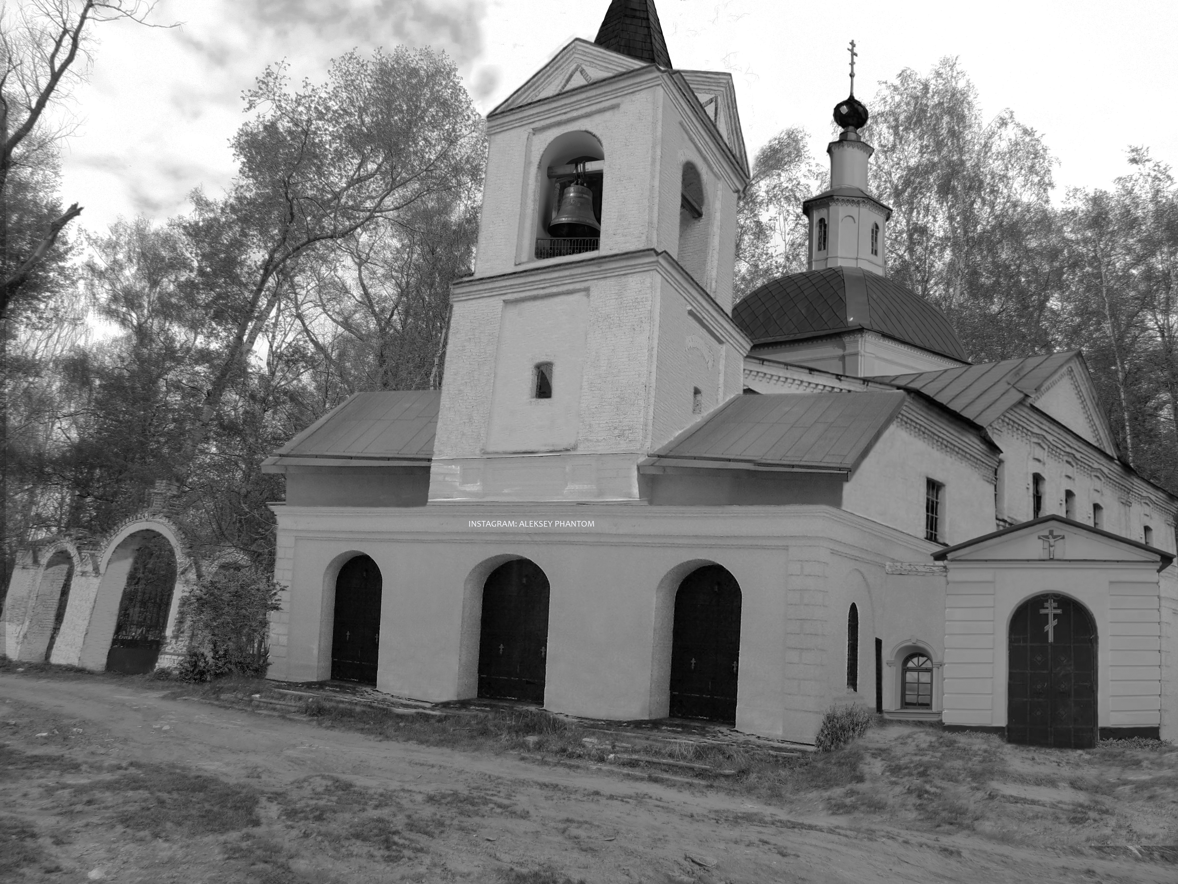 В 1808 году (19 веке) в деревне Меркутино Вязниковского района Владимирской области была построена церковь в честь Святого апостола Иоанна Богослова. На этой фотографии показано как примерно выглядела эта церковь. К сожалению в 20-ом веке церковь была разрушена. Сейчас на этом месте остались лишь развалины.